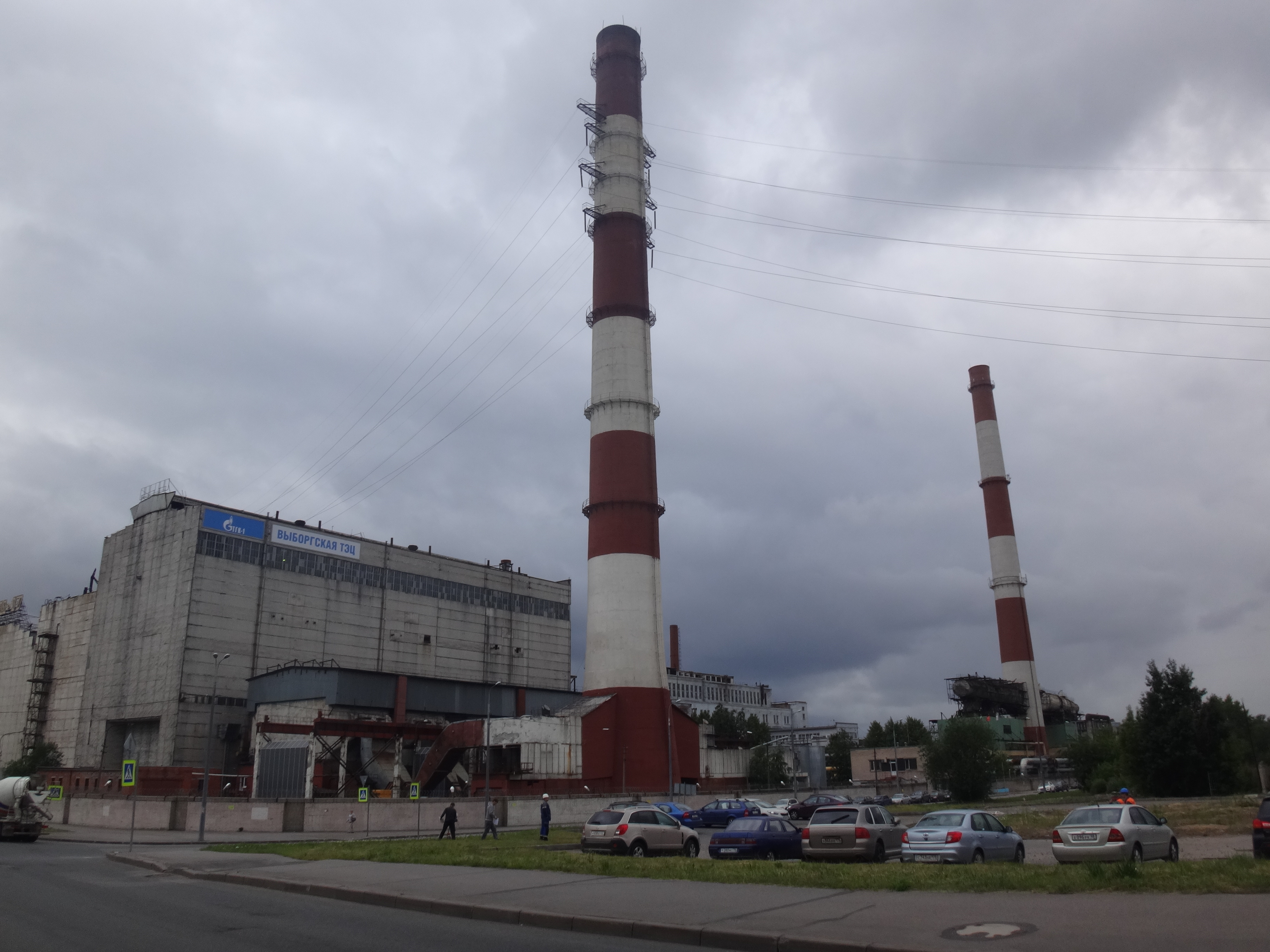 ТЭЦ-17 или Выборгская